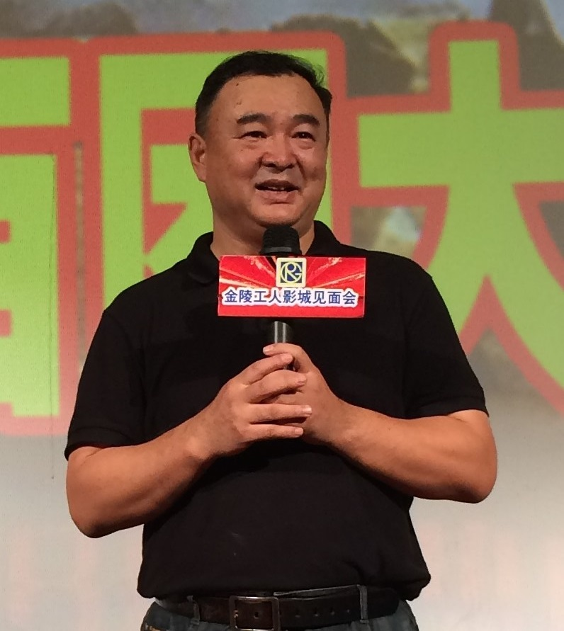 导演宁海强出席电影百团大战剧组见面会，在南京金陵工人影城，截取自File:Movie hundred group battle,in Nanjing,20150831,01.jpg